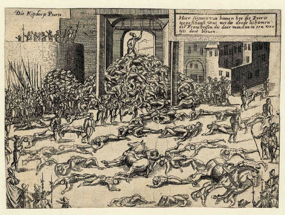 Franzosenmord in Antwerpen; Kupferstich, 1576 (?)